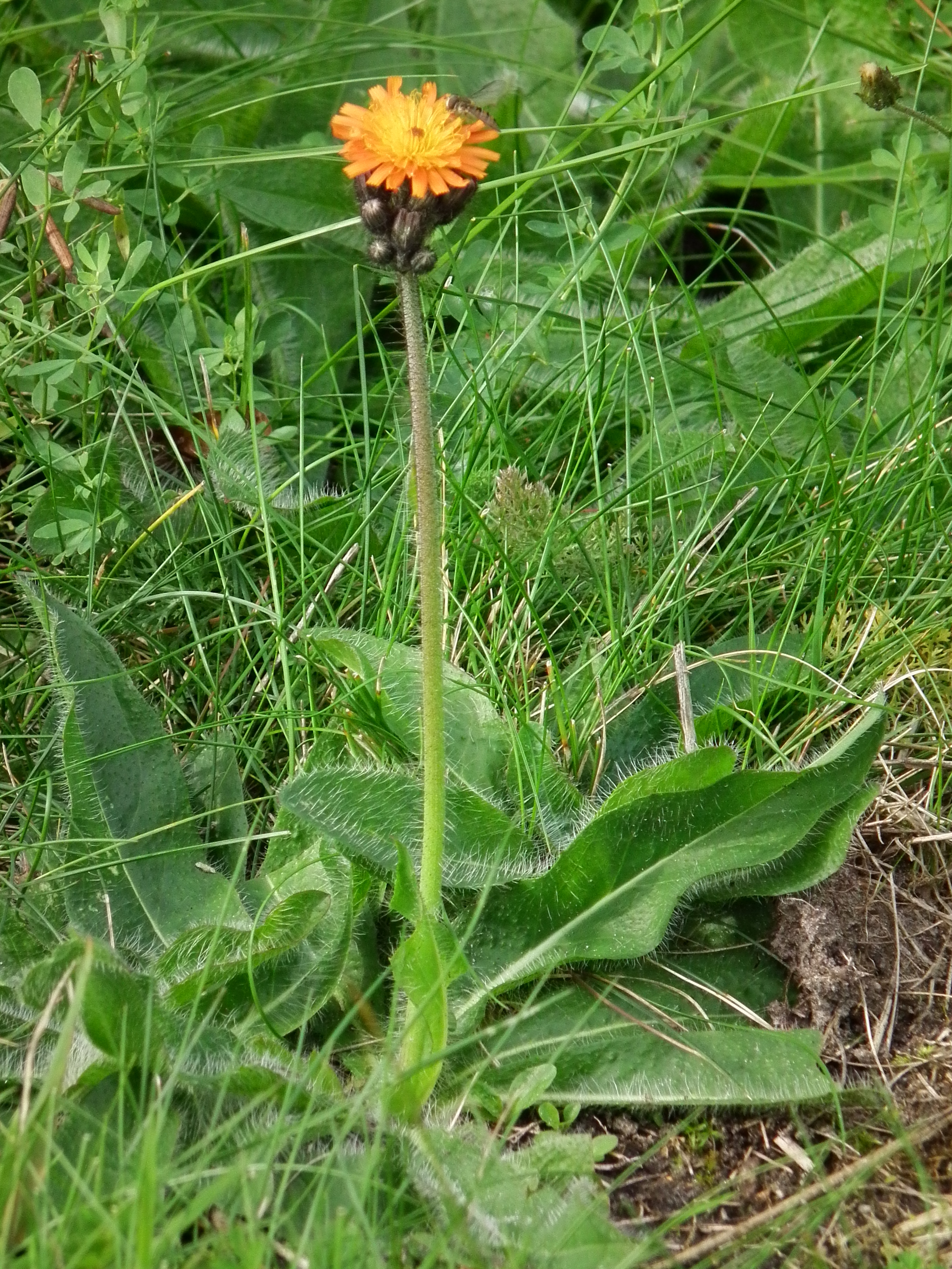 Orangerotes Habichtskraut (Hieracium aurantiacum), fotografiert in der Nähe des Heseper Moors (Niedersachsen, Deutschland)